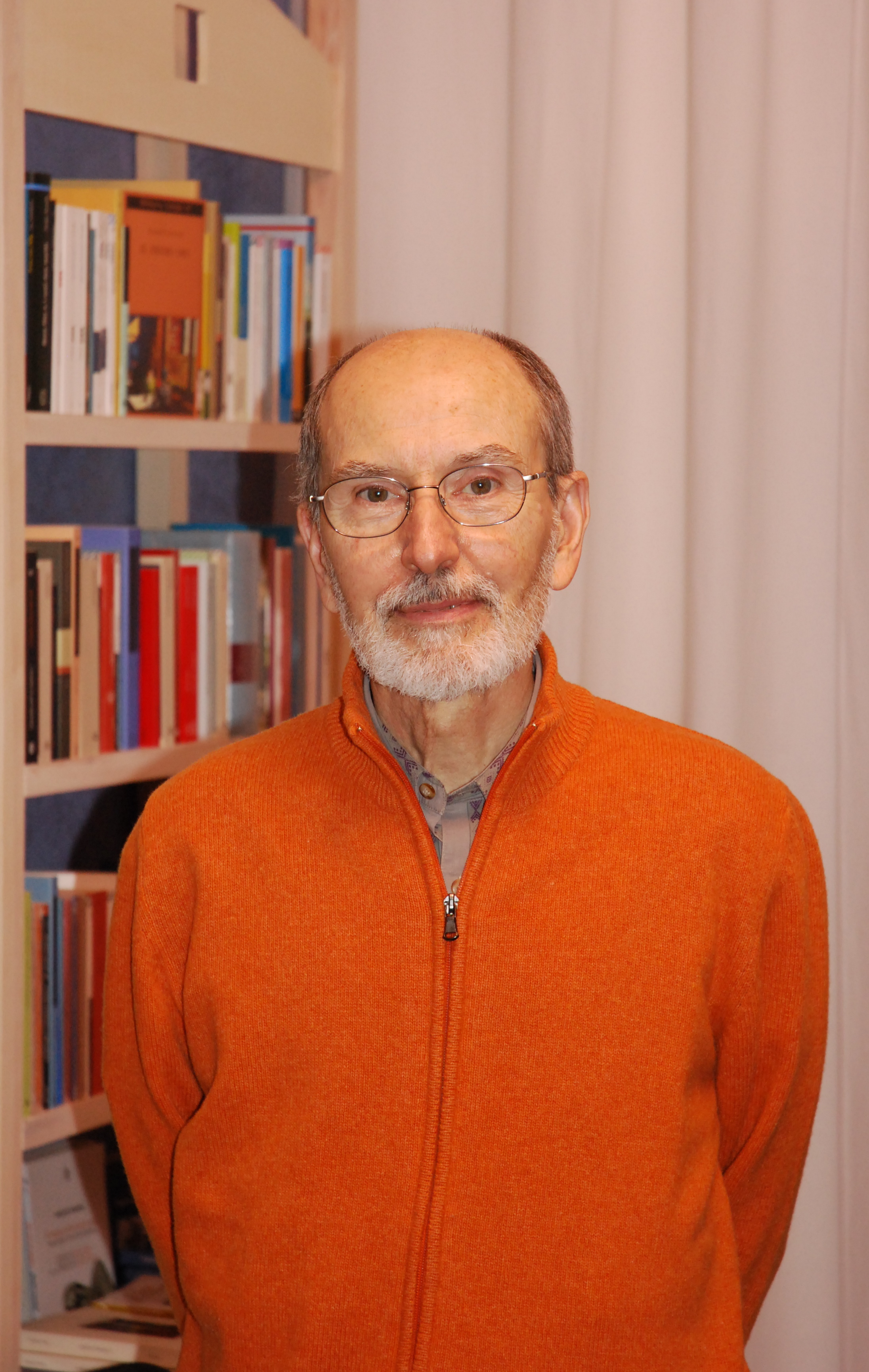 Sergio Zaniboni, alla presentazione di Steam Rail, Torino, novembre 2008